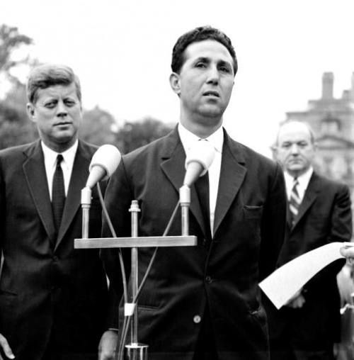 En Octobre 1962, le Président du Conseil algérien, Ahmed Ben Bella est reçu à la Maison Blanche par le Président américain John Kennedy.